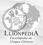 Se trata del logotipo de la enciclopedia virtual Llionpedia